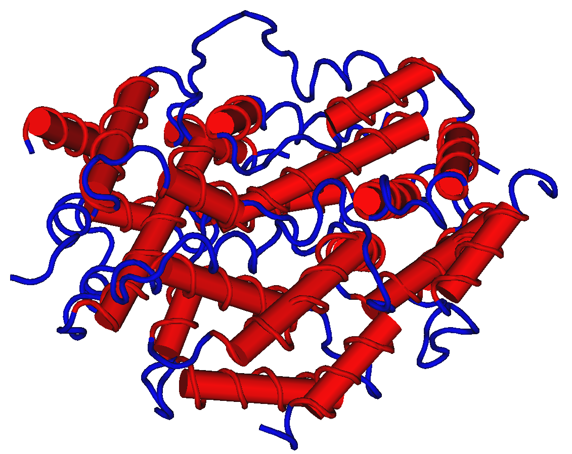 1HIG_Interferon-Gamma